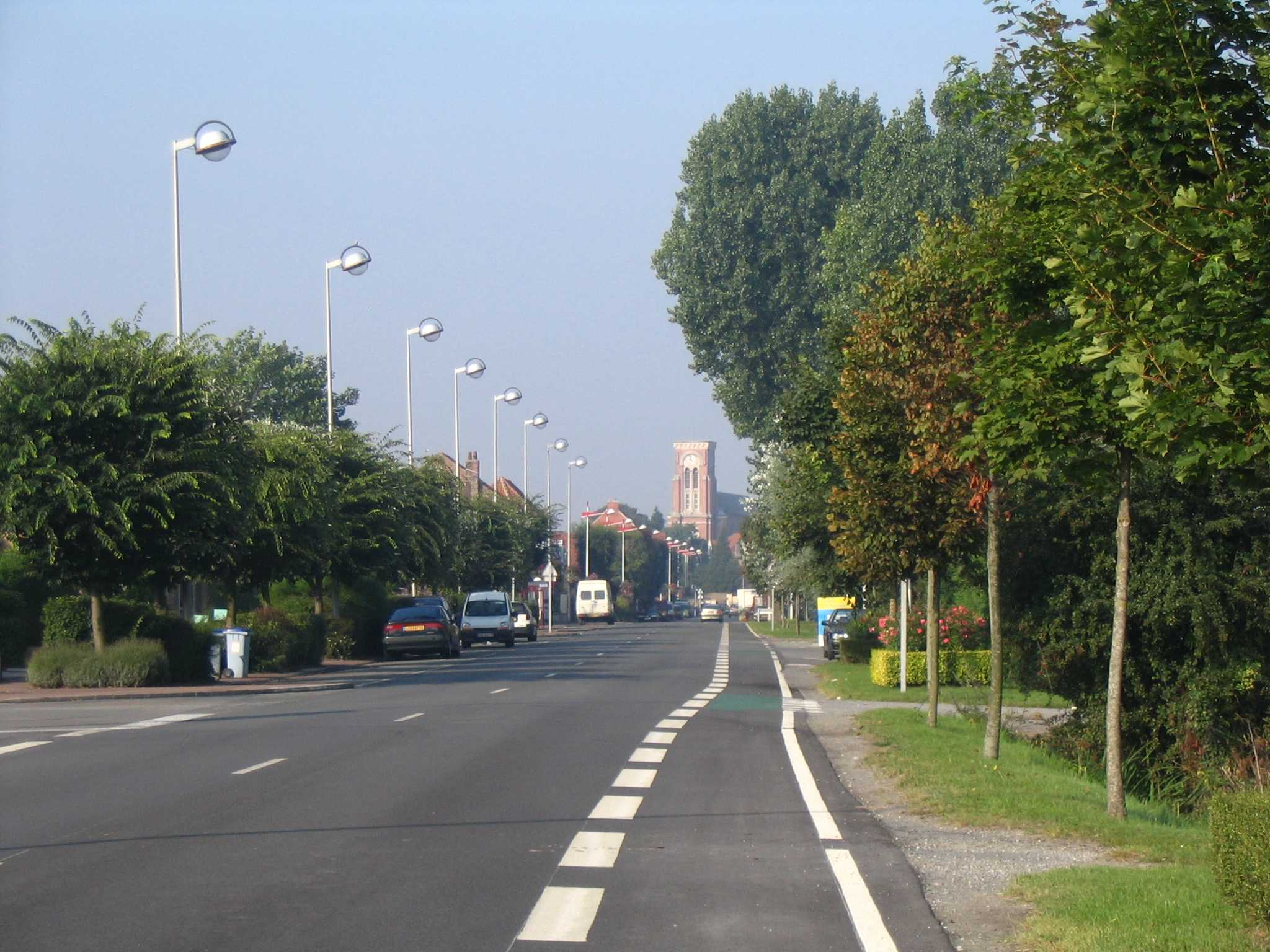 Loon-Plage vu de la rue Georges Pompidou. Voir . Par Antoine.